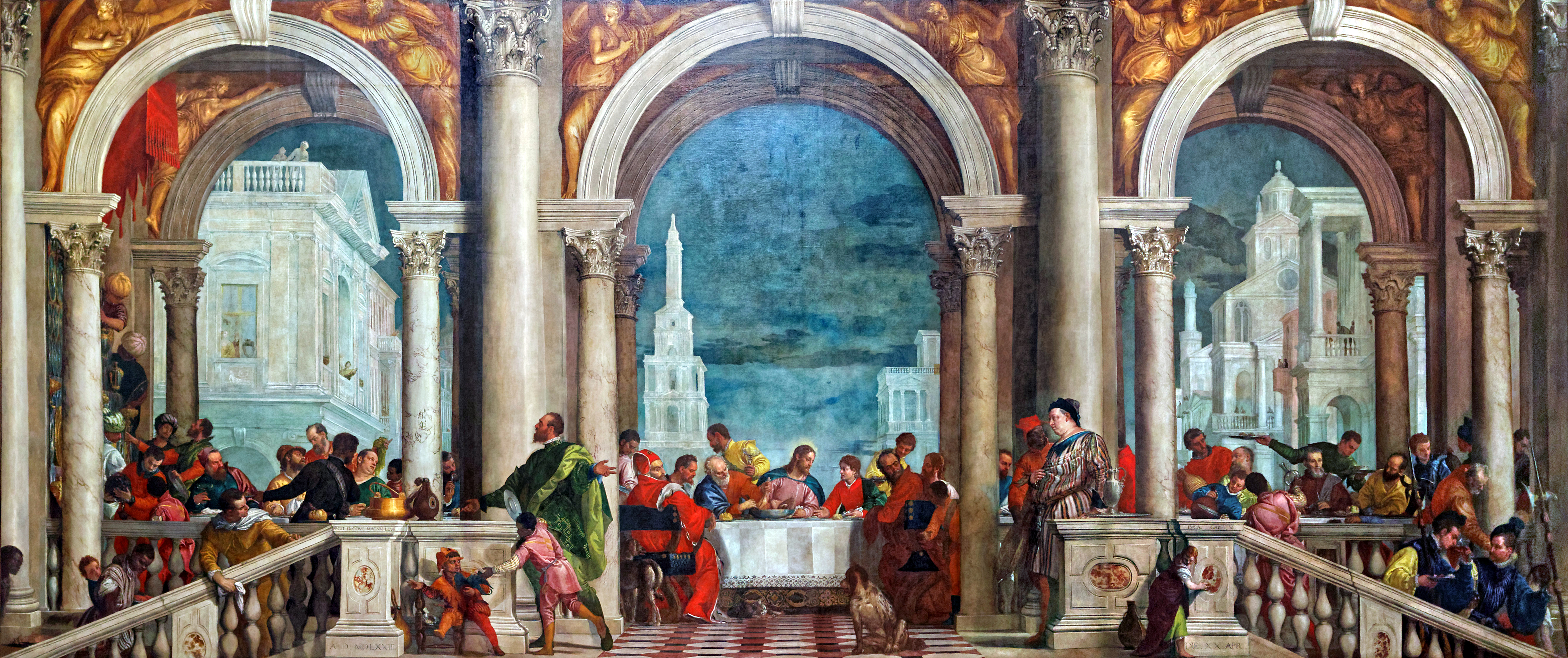 The Feast in the House of Levi - Paolo Veronese Cena in Casa Levi - Olio su tela del Manierismo veneto, loggia a serliana, architettura classica rinascimentale palladiana-sanmichelina, notturno, ordine corinzio, bassorilievi, tavola imbandita, vesti preziose, classi sociali, soldati, patrizi, brorghesi, servitori, italiani, africani, turchi ottomani, turbanti, cani, gatto, prelati, santi, giullare - buffone, bambini, adulti, uomini, cibo, vino, camerieri (Light correction by Paolo Villa)